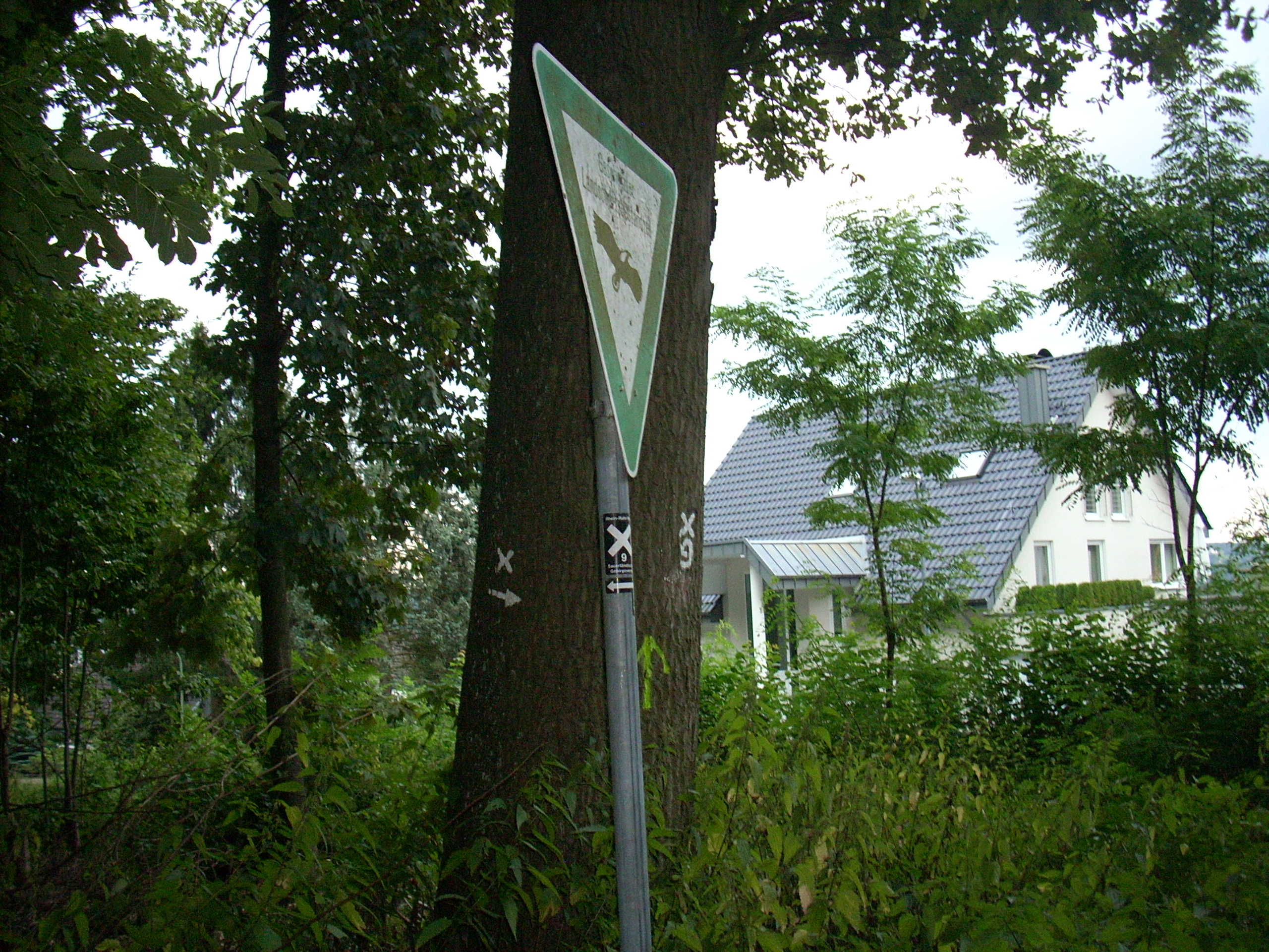 Naturschutzschild „Geschützter Landschaftsbestandteil“ mit Wanderzeichen im Fleyer Wald im Erlhagen, Hagen